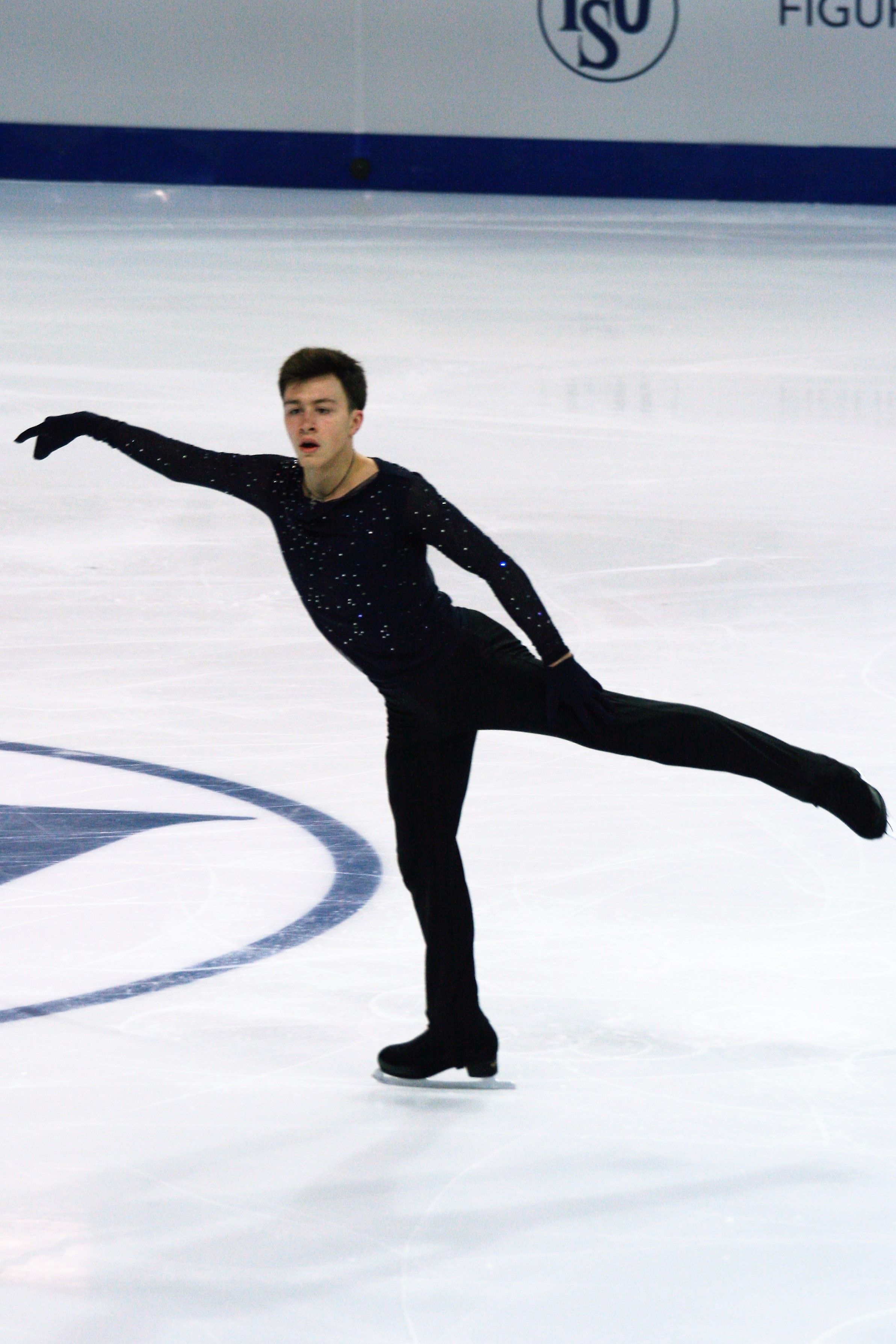 Дмитрий Алиев (Россия) на финале Гран-при по фигурному катанию среди юниоров 2016-2017